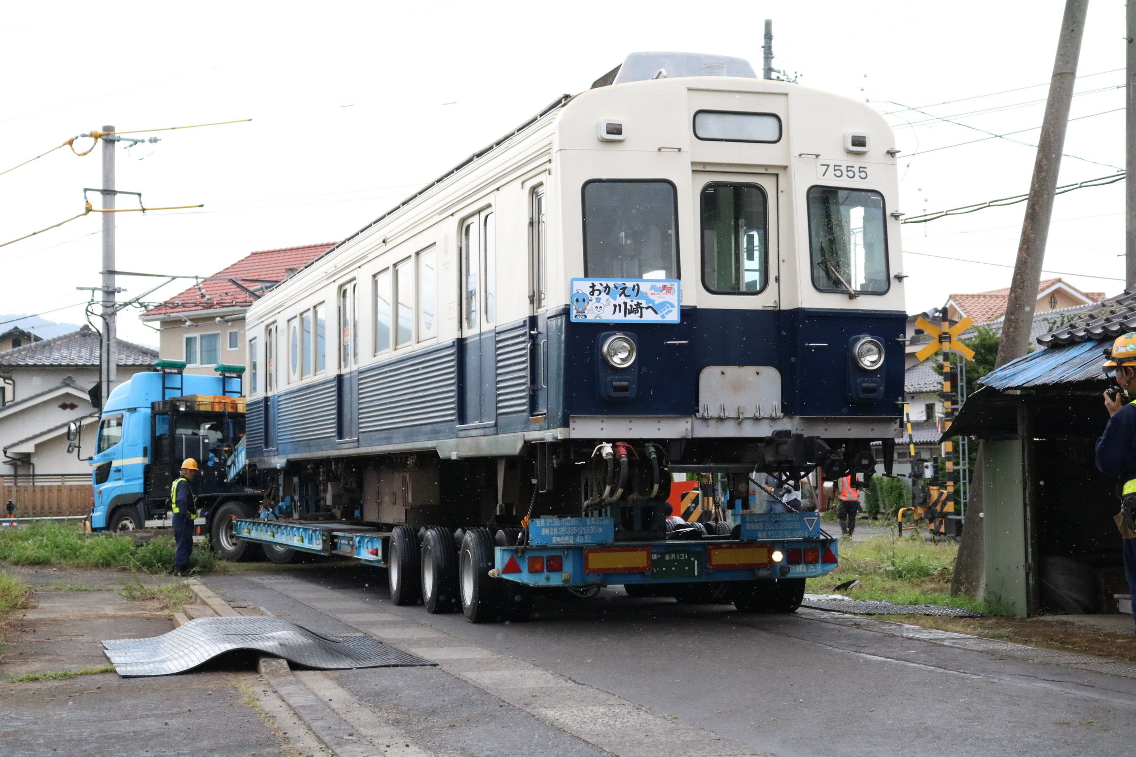 2018年8月13日 中塩田駅にて